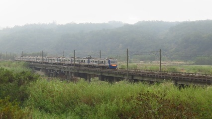 山線鐵路 第一三叉河橋 was filmed by TDCKW on 20190105